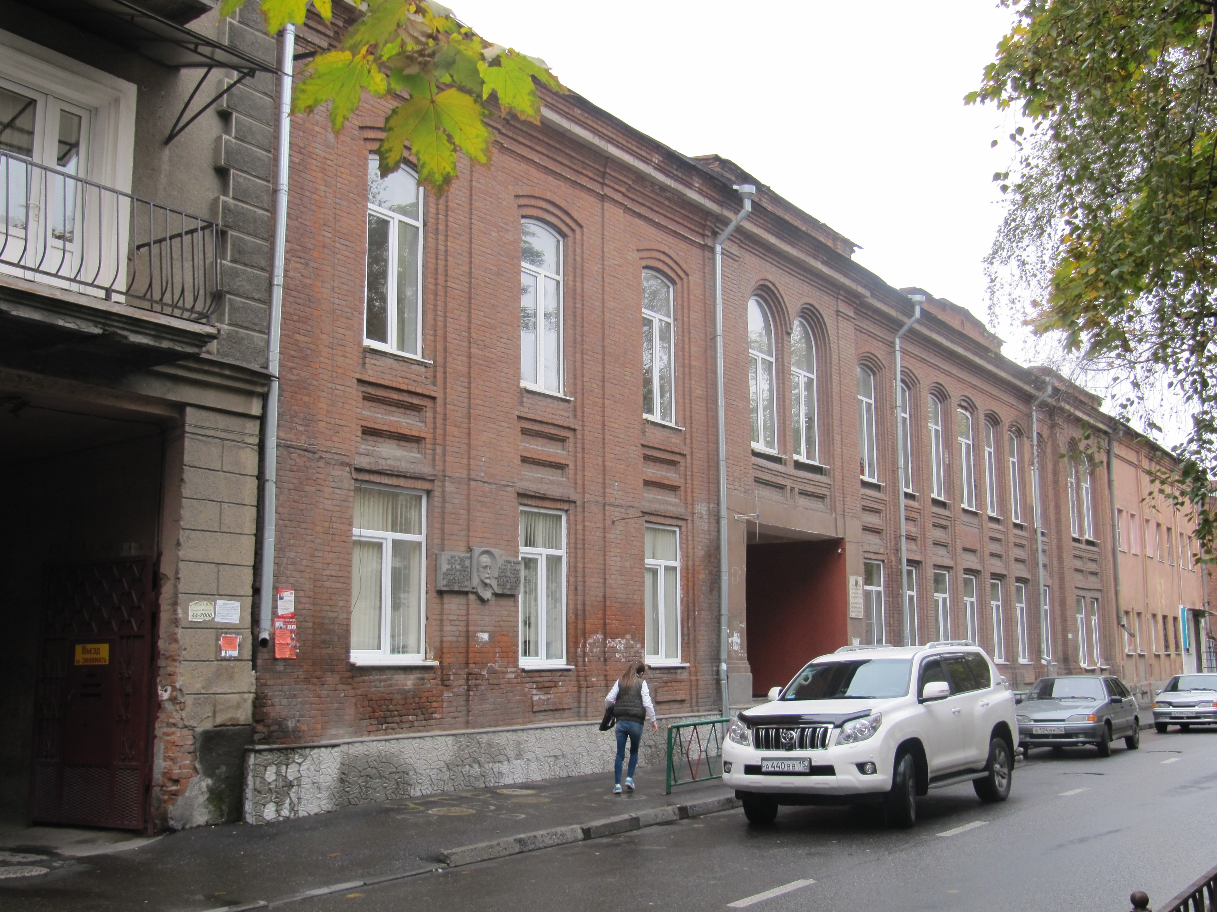 Дом № 29 на улице Миллера, Владикавказ